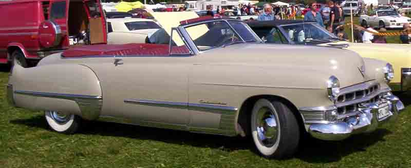 1949 Cadillac Series 49-6267X Convertible Coupe